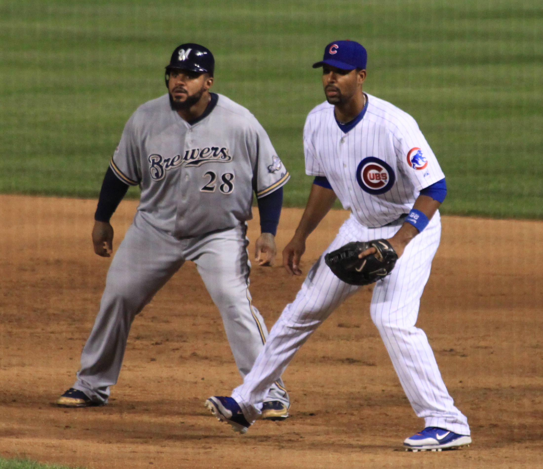 Prince Fielder (left) and Derrek Lee